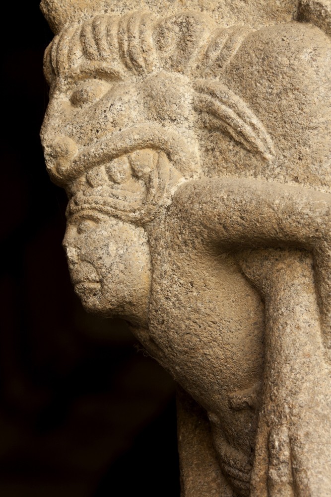 unidentified Spain